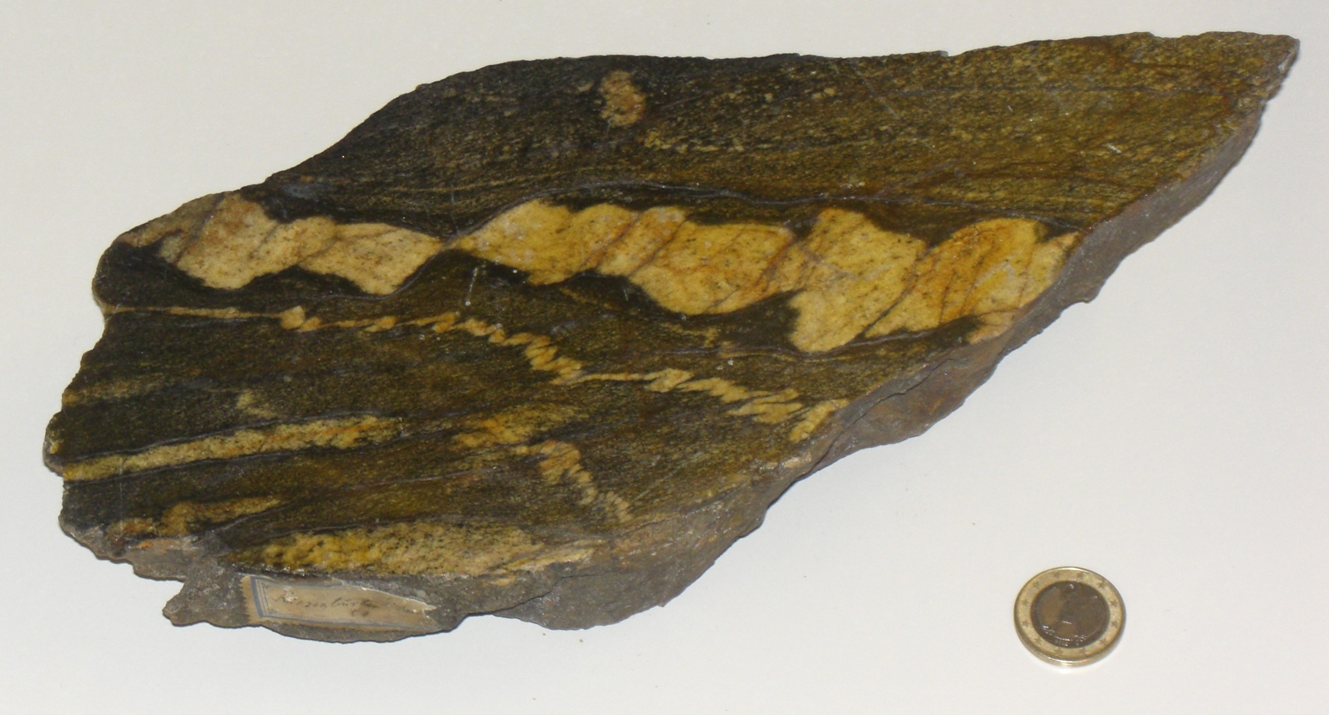 Migmatitischer Gneis aus Riesenburg. Handstück: 10 mal 20 cm. Blick auf die gesägte, glattgeschliffene und polierte Seite. Das (helle) Leukosom und das (dunkle) Melanosom sind deutlich zu unterscheiden. Die mehrere cm mächtige Quarz-Feldspat-Lage (Leukosom, oben) ist boudiniert, d. h. im duktil verformbaren biotitreichen Melanosom als spröder Körper zerbrochen und zerschert. Fotographie: Chadmull, 5. Februar 2006. Frei für alle Verwendungszwecke.